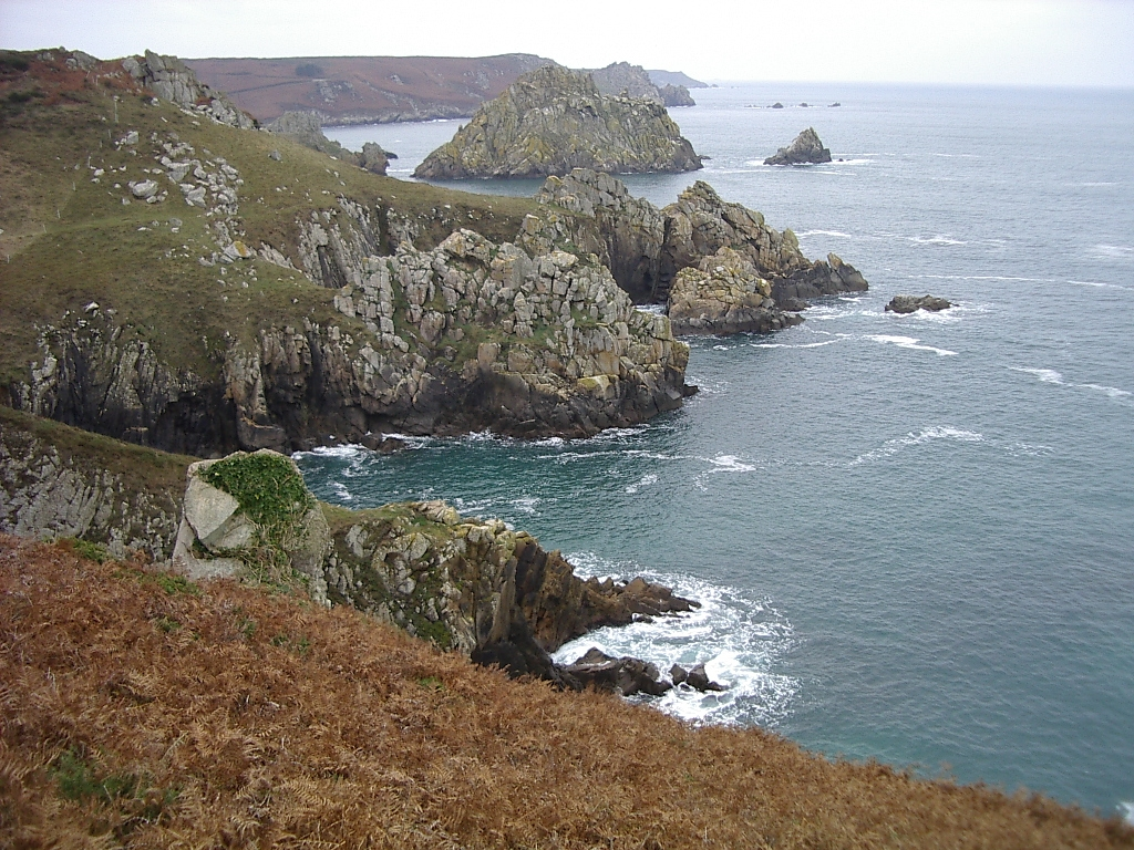 Côte nord du Cap Sizun, Finistère, France